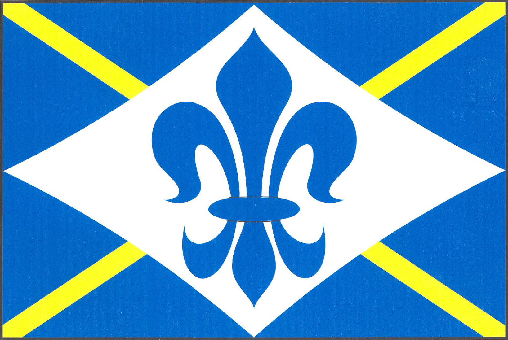 Vlajka obce Stanoviště